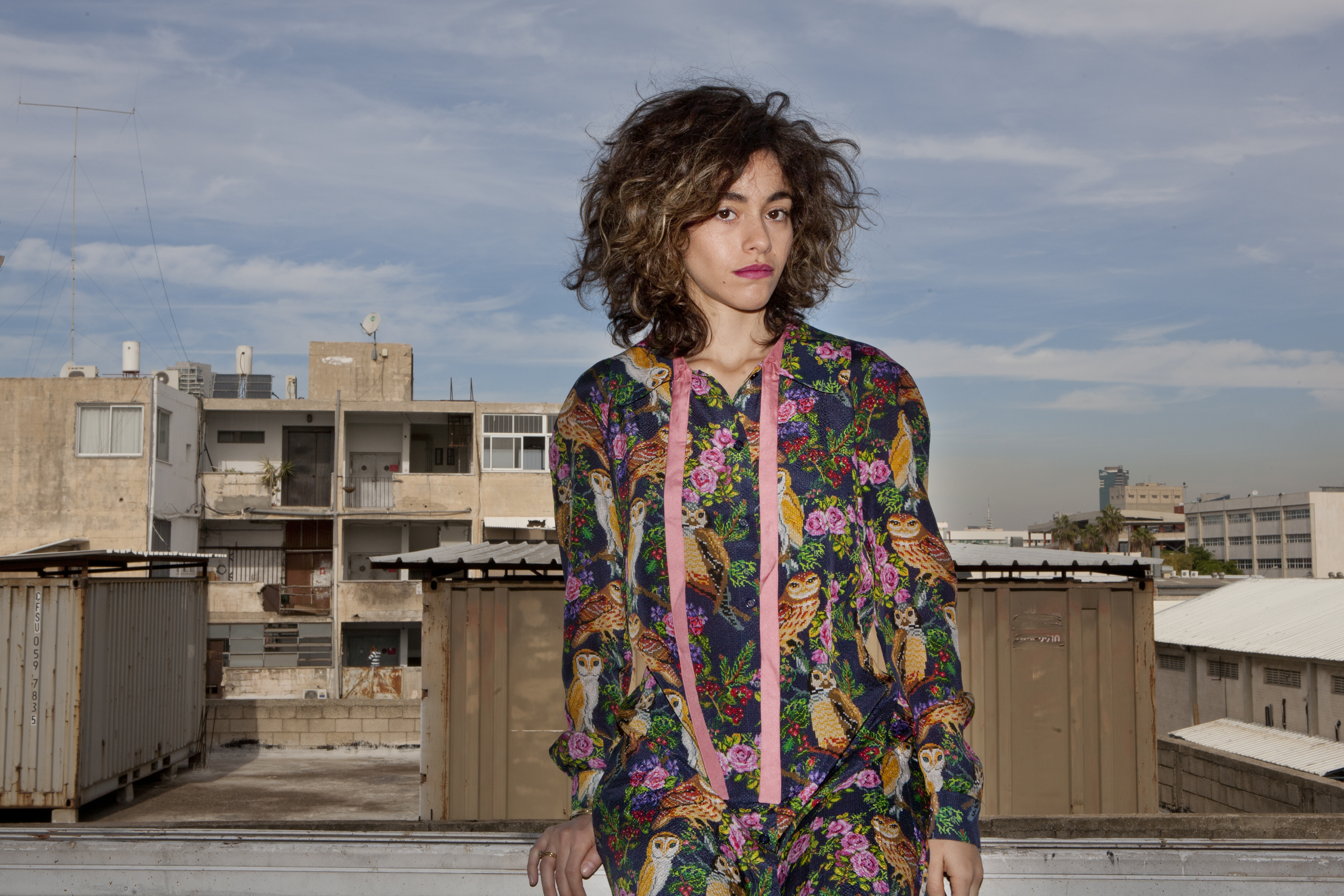 ריף כהן על רקע נוף